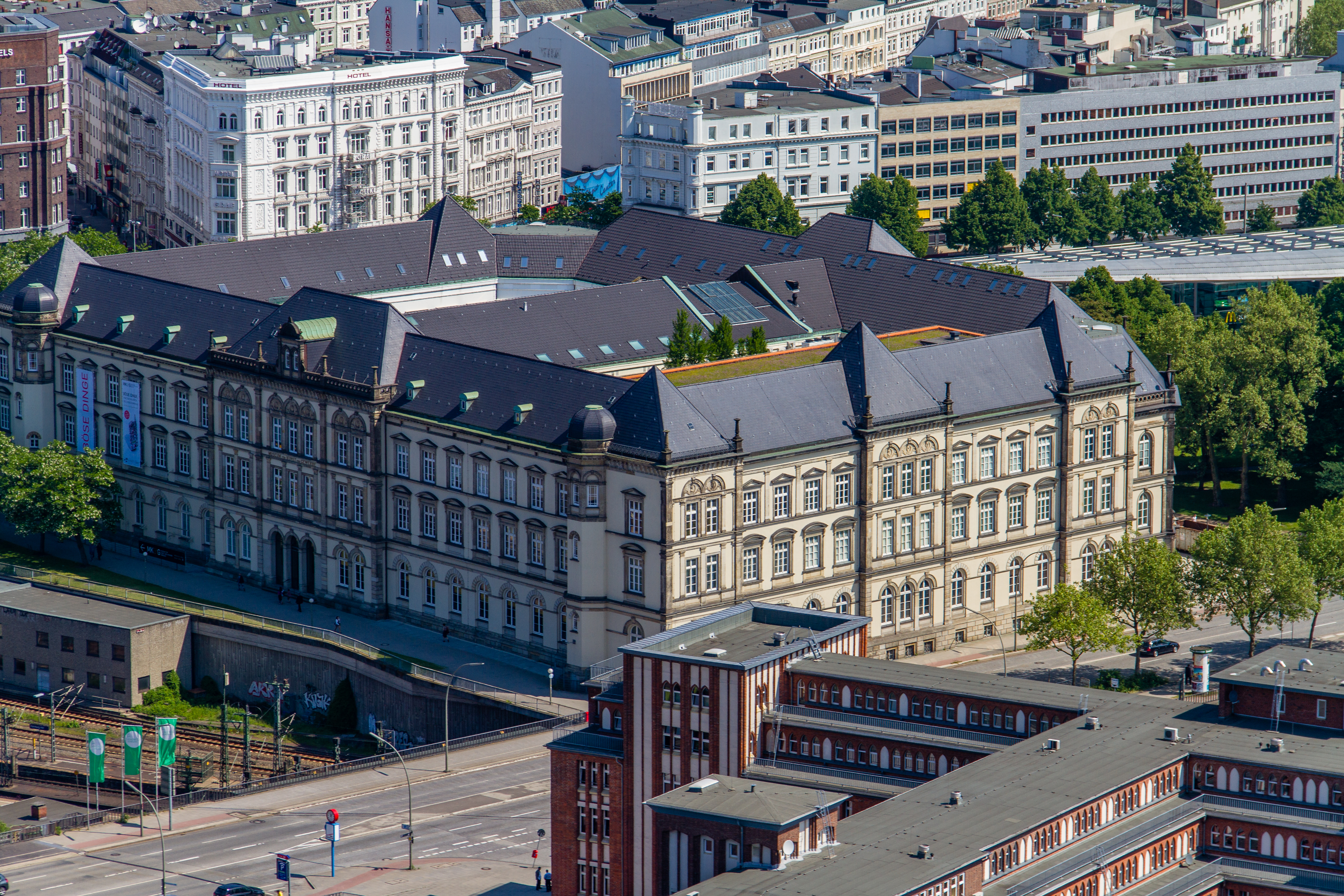 Aufnahme während des Projekts Heißluftballon